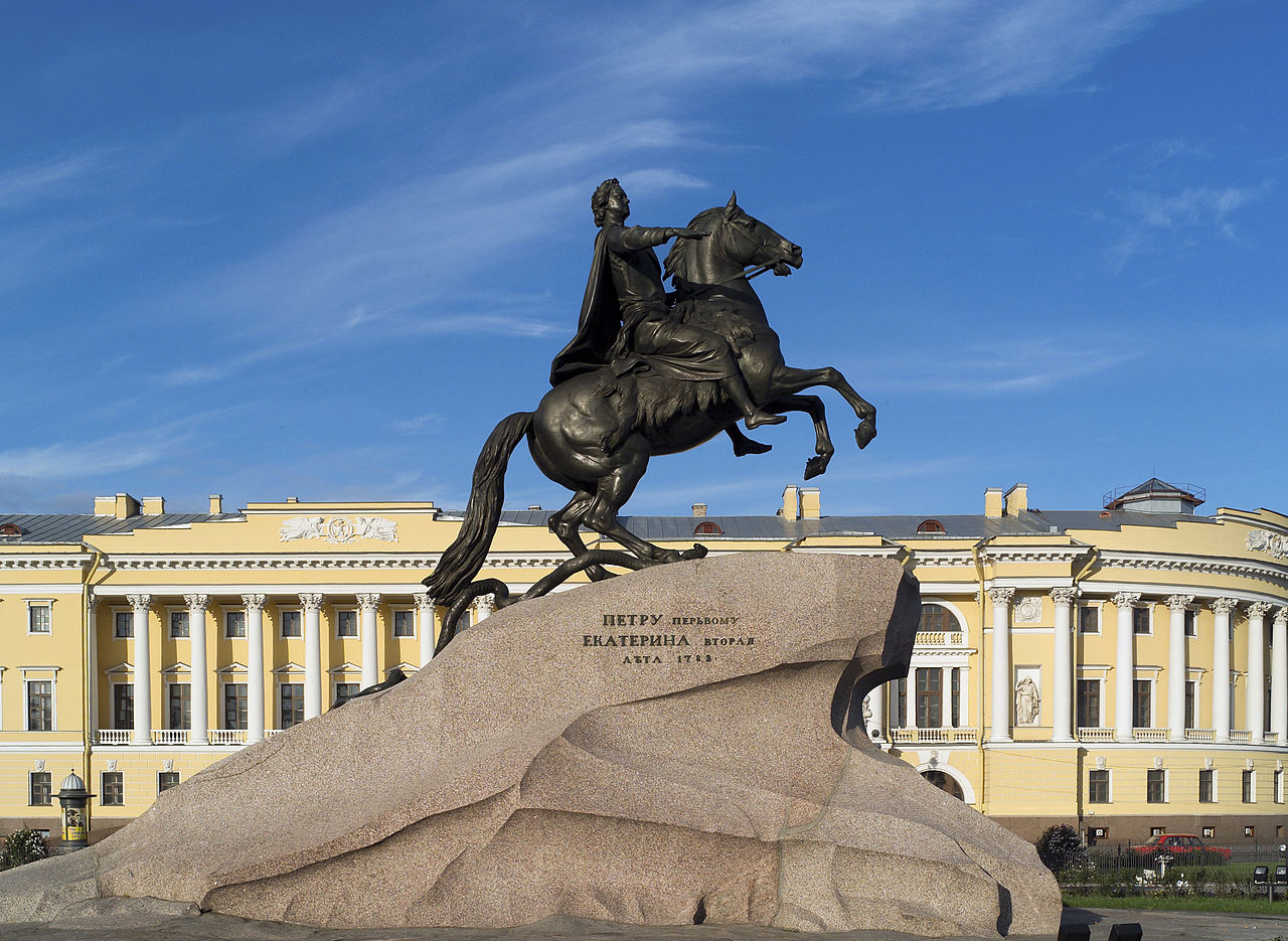 Pedro I Emperador de Rusia, Construyó Petersburgo